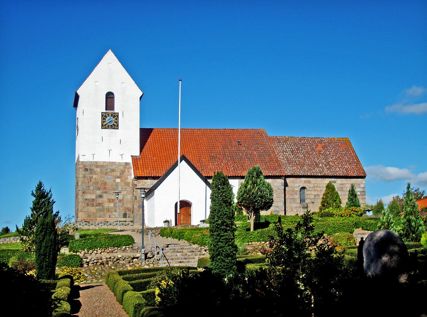 fra syd